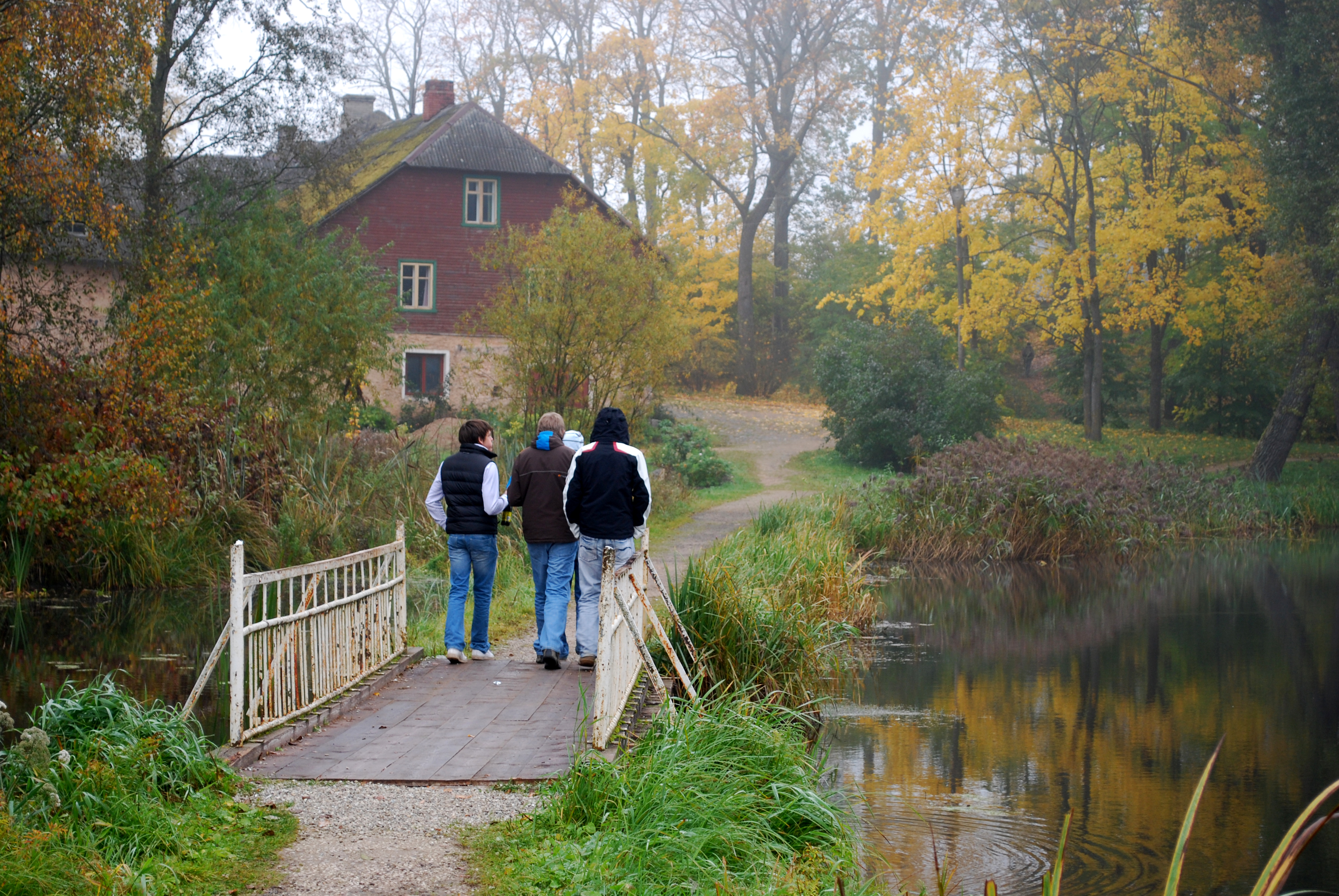 Väimela